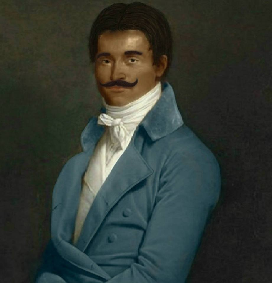 Retrato de Don Dionisio Inca Yupanqui existente en el Colegio de Abogados de Lima